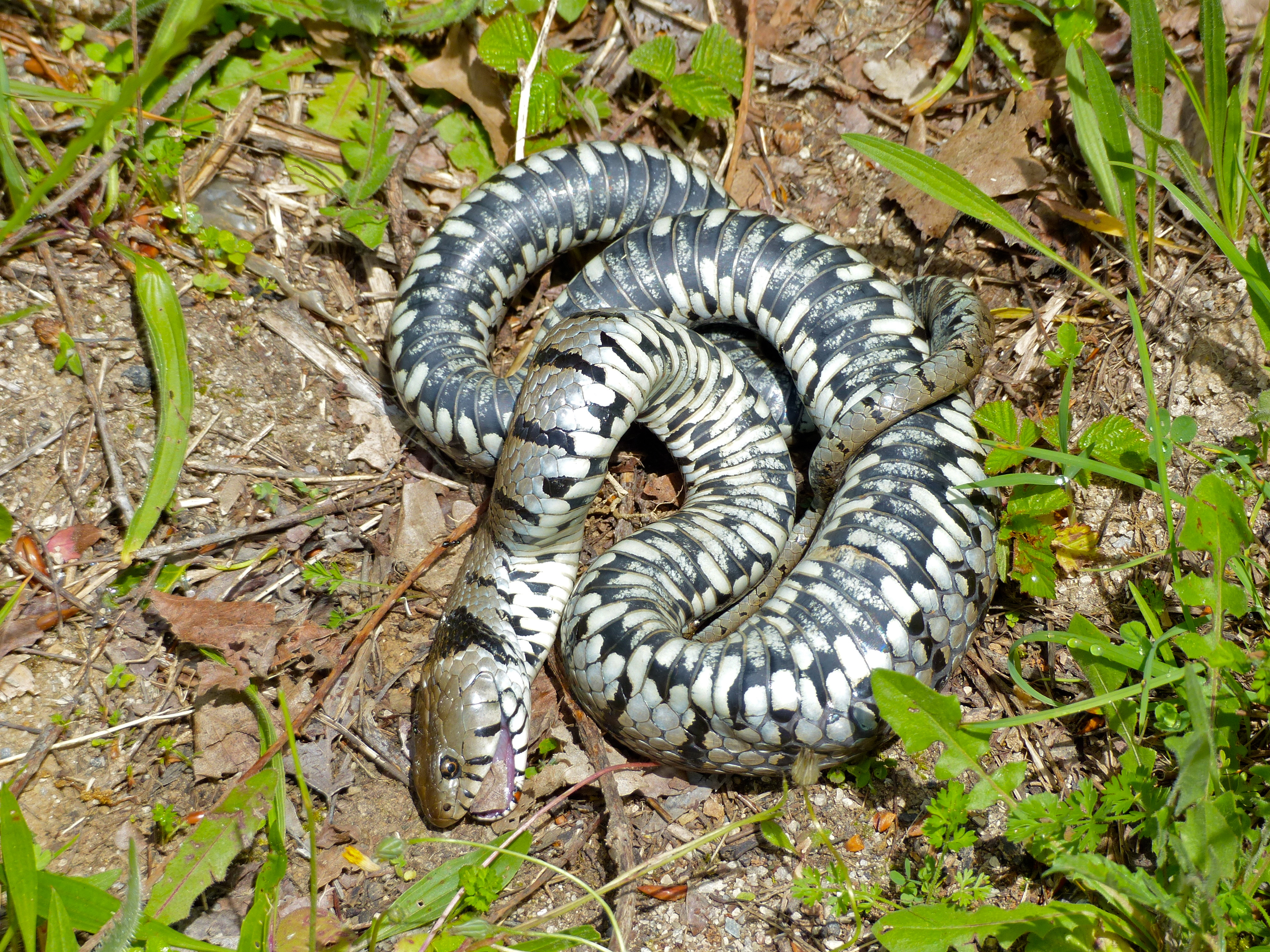 Avène, Hérault, FRANCE